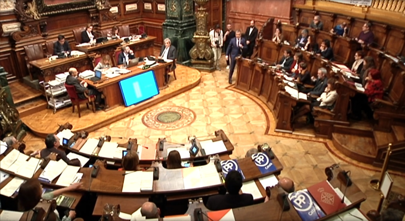 Plenari del Consell Municipal 29/03/2019.